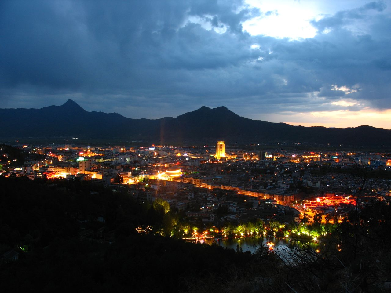 העיר ליג'יאנג, ברקע הר שלג דרקון הירקן.